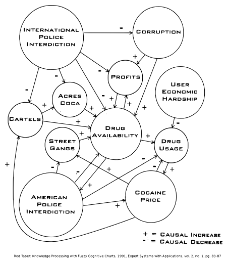 Fuzzy Cognitive Map Erlaubnis der Urhebers (xxx in E-Mail-Adressen gegen Spam) Return-Path: Delivery-Date: Mon, 14 May 2007 16:05:21 +0200 Subject: RE: Fuzzy Cognitive Maps Message-ID: In-Reply-To: From: "Taber, Rod" To: Return-Path: X-OriginalArrivalTime: 14 May 2007 14:05:06.0122 (UTC) FILETIME=[DFD4F2A0:01C79630] certainly. Rod Taber, Ph.D. Fairfax, VA Original Message From: Goetz Kluge [1] Sent: Sunday, May 13, 2007 1:44 PM To: Taber, Rod Subject: Fuzzy Cognitive Maps Dear Mr. Taber, In order to promote the usage of FCMs, I would like to use your FCM on drug dealing published in Knowledge Processing with Fuzzy Cognitive Charts, 1991, Expert Systems with Applications, vol. 2, no. 1, pg. 83-87 (and quoted by Bart Kosko in "Fuzzy Thinking"). The usage would be in Websites. The graphics is a good example how to present complex relations. The FCM would be put in contrast to oversimplifications in political debates. In the German Wikipedia I entered a FCM as matrix in the article on drug related crime. Could I enter the FCM, which Bart Kosko used, in the Wikipedia? With my best regards Goetz Kluge Munich, Germany